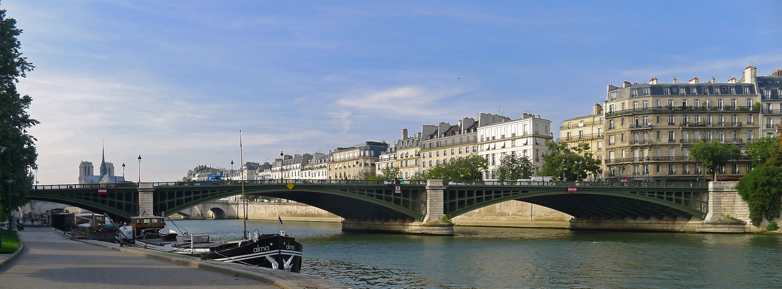 Pont de Sully (partie sud) et port de la Tournelle ; en arrière plan, l'île Saint-Louis - Paris IV